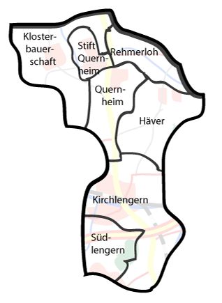 Maps of Kreis Herford (Germany) series. Shows various kinds of information including topographical, demographical, and use of land information for all communities of Kreis Herford and the district of Herford itstelf.